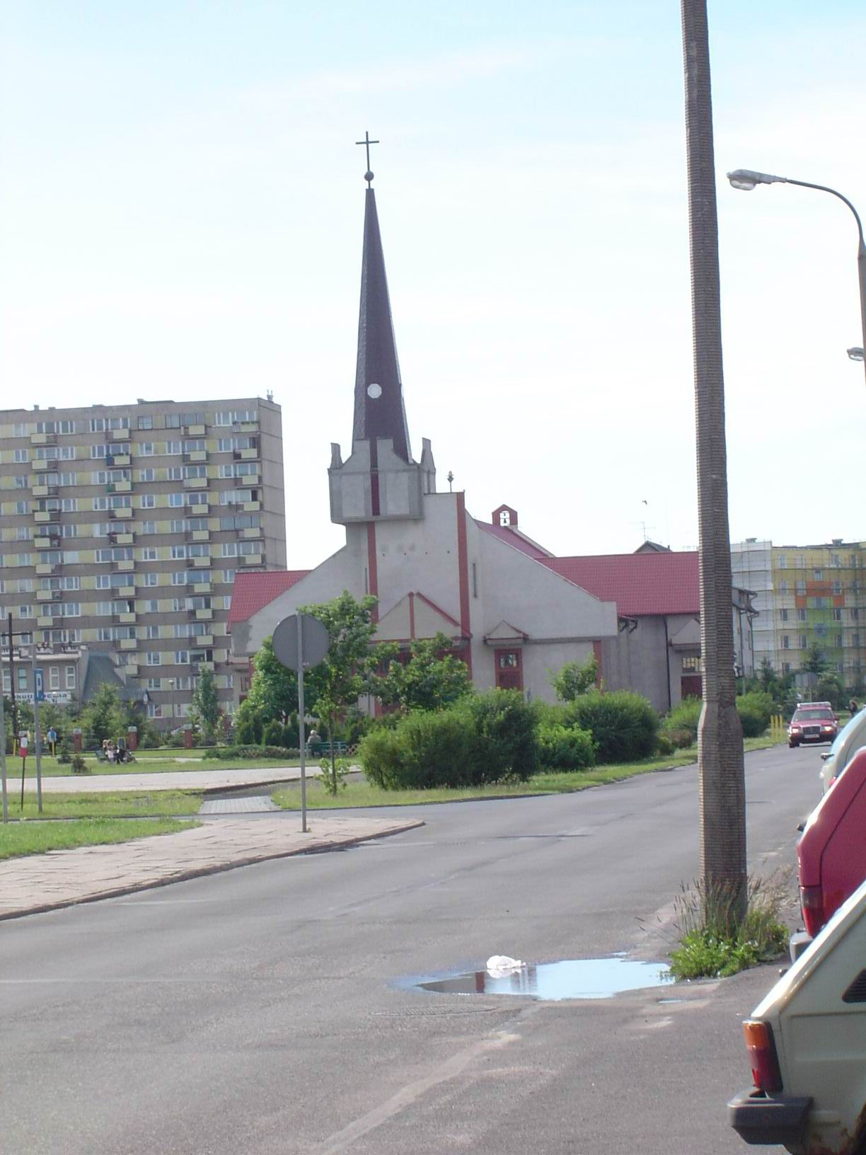 Kościół pw. św. św. Apostołów Piotra i Pawła w Grudziądzu, os. Lotnisko